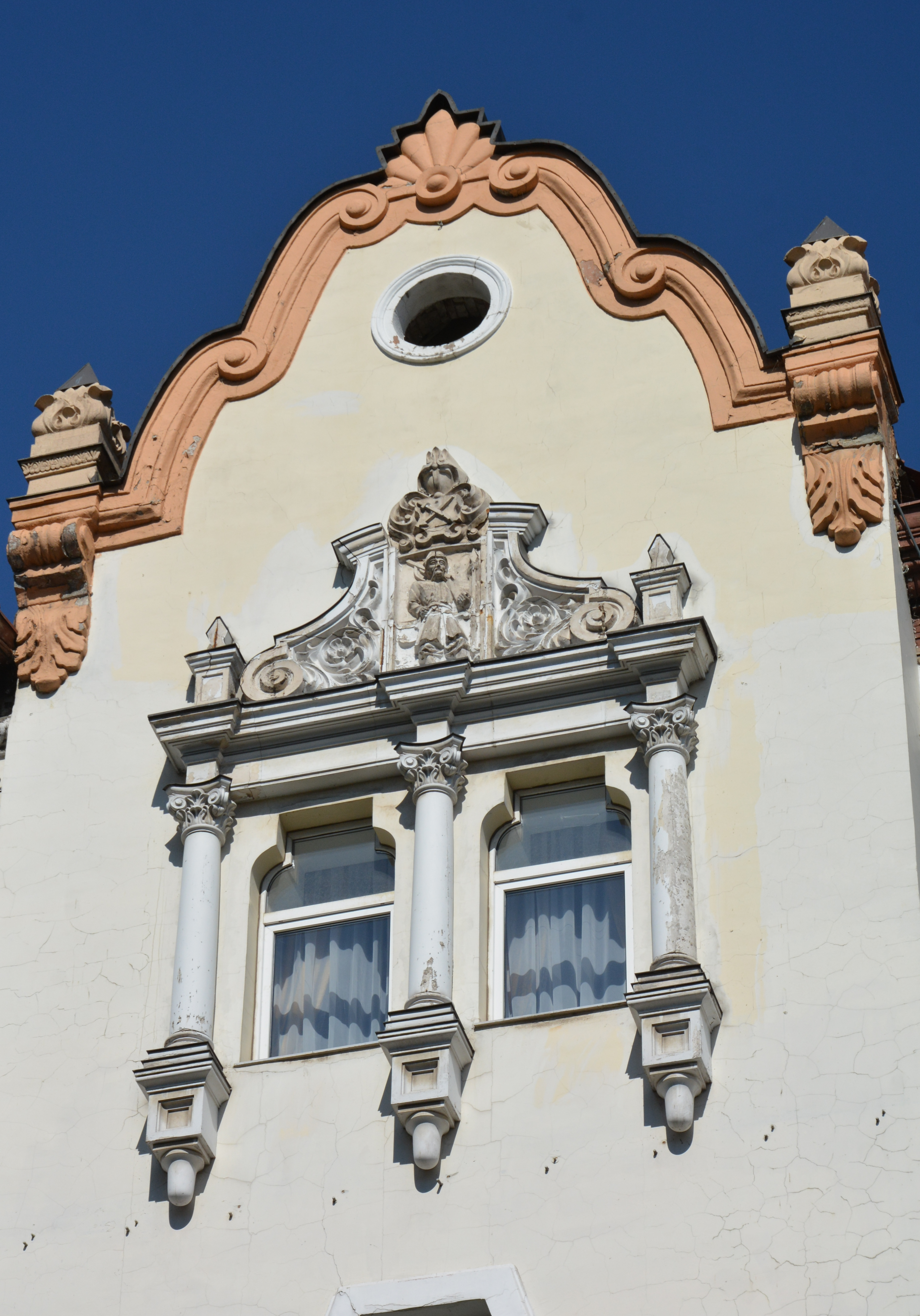 Будинок готелю "Україна", Дніпропетровськ, Короленка вул., 2